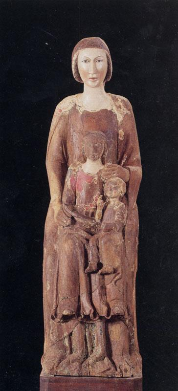 La statua di Sant'Anna Metterza del XIII secolo è custodita nel Museo Diocesano Teatino di Chieti, che è situato vicino alla Chiesa di San Domenico.